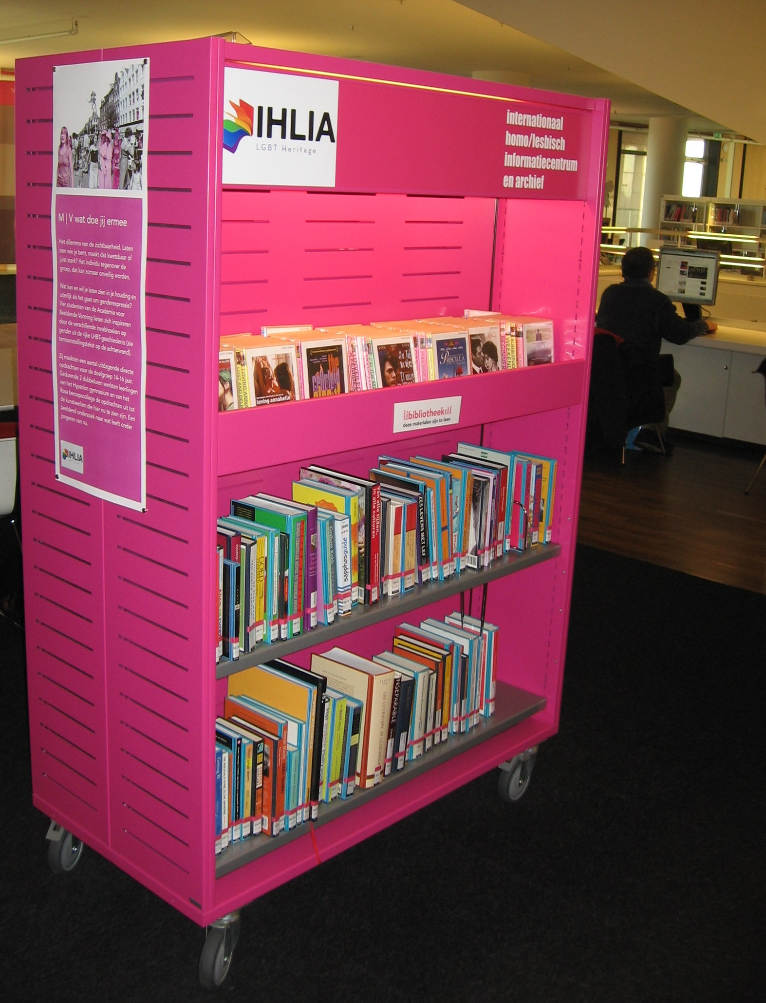 IHLIA LGBT Heritage - Roze Kast